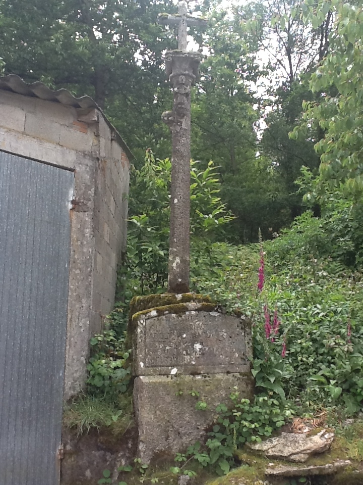 Cruceiro de Cadaval, O Castro, Dozón